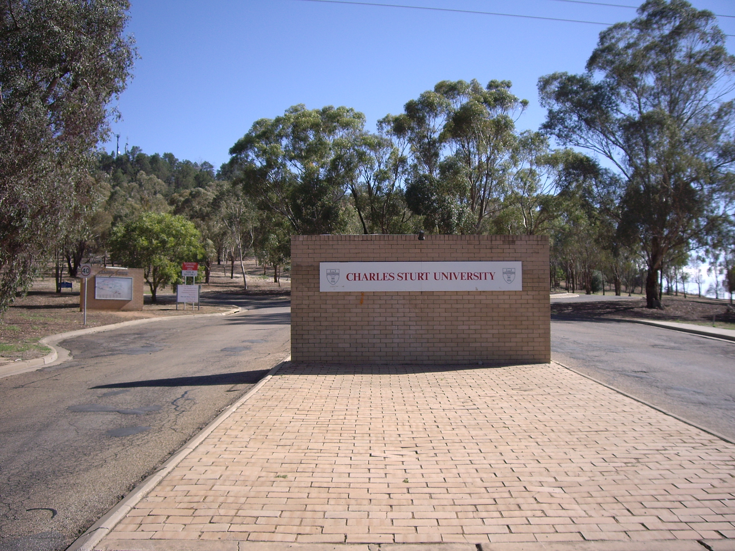 CSU Wagga Campus Entrance